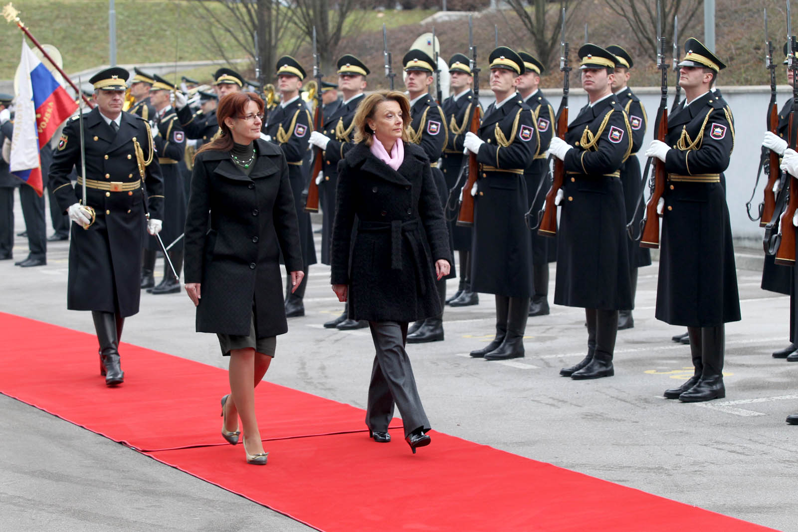 Na uradnem obisku v Sloveniji ministrica za obrambo Črne gore dr. Milica Pejanović-Đurišić.